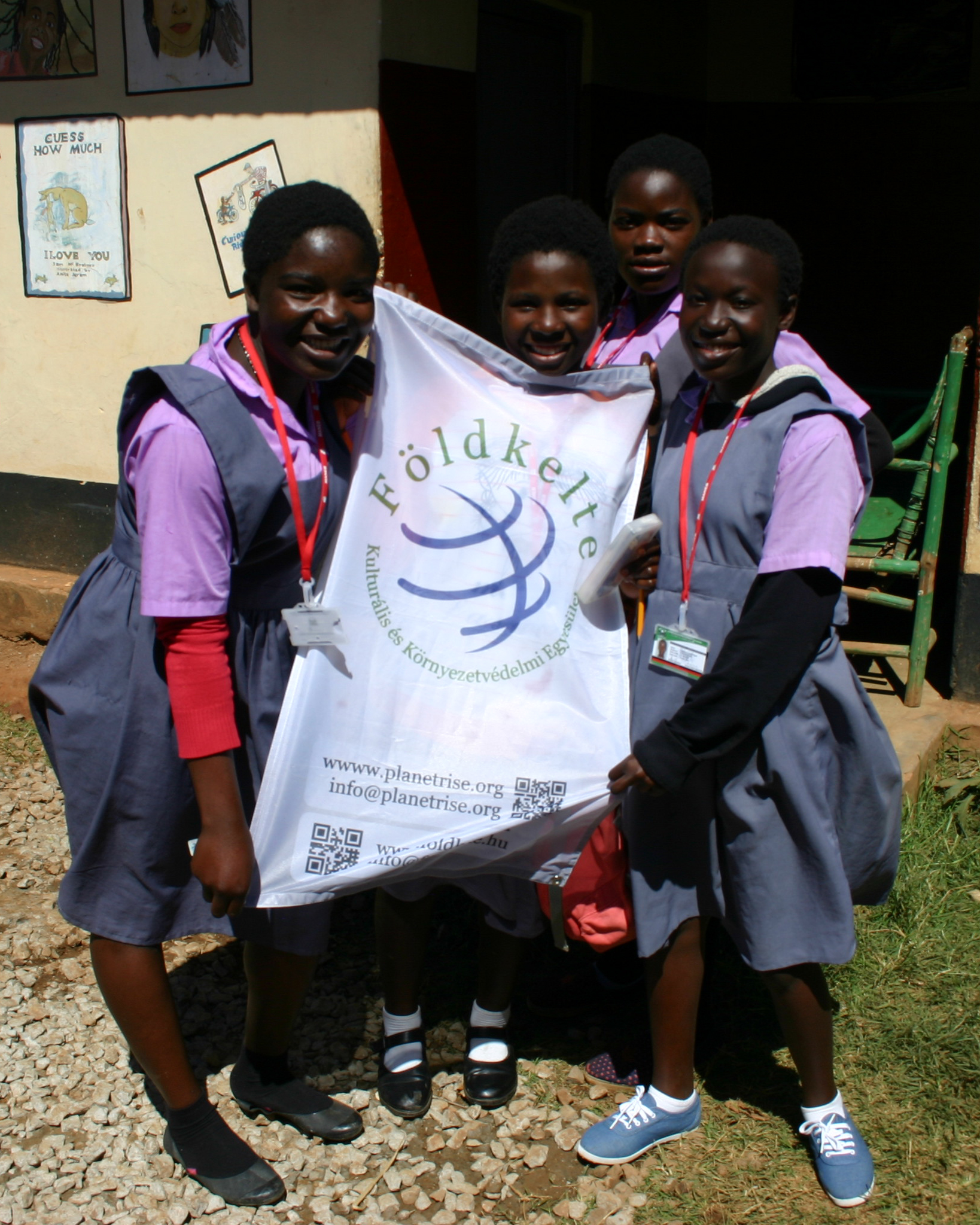 A Jacaranda Iskola diákjai az Egyesület zászlajával.